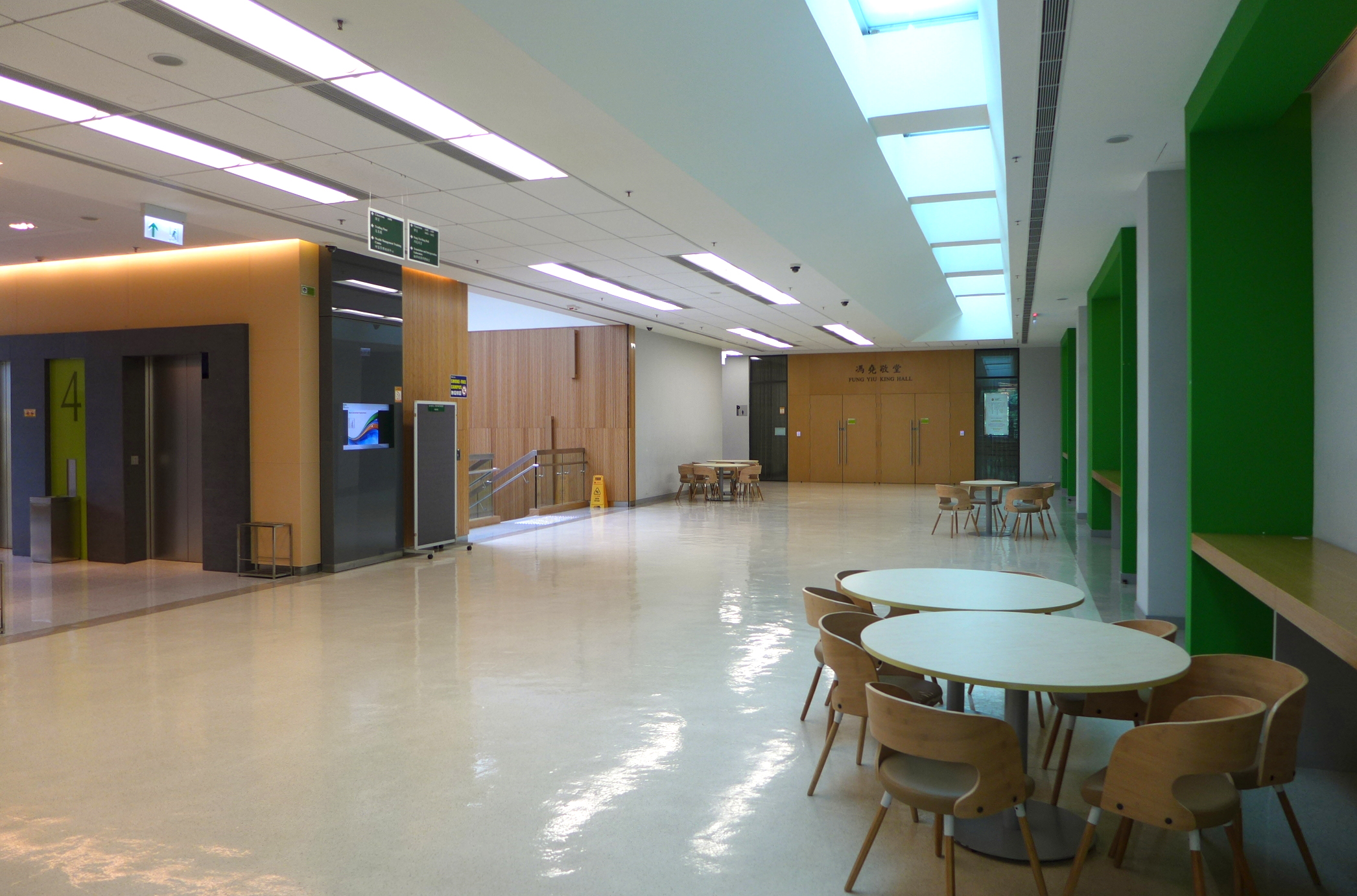 Hang Seng Management College